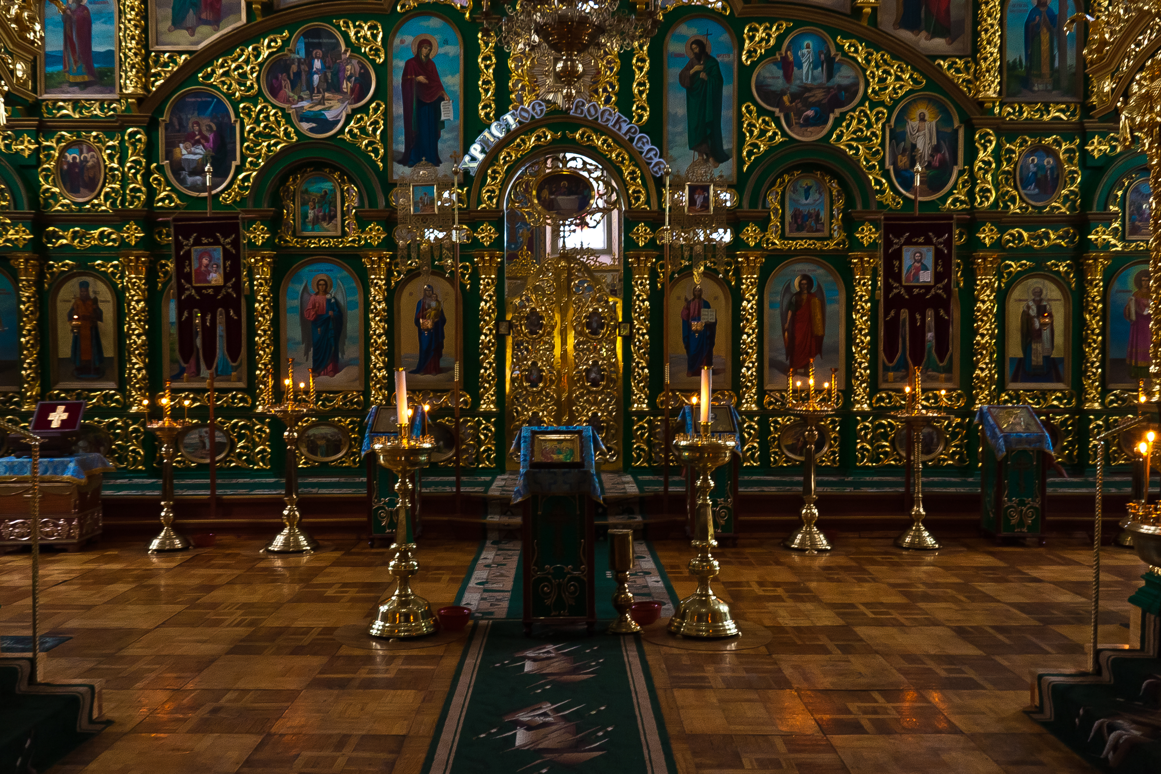 Троїцький собор (мур.), с.Густиня